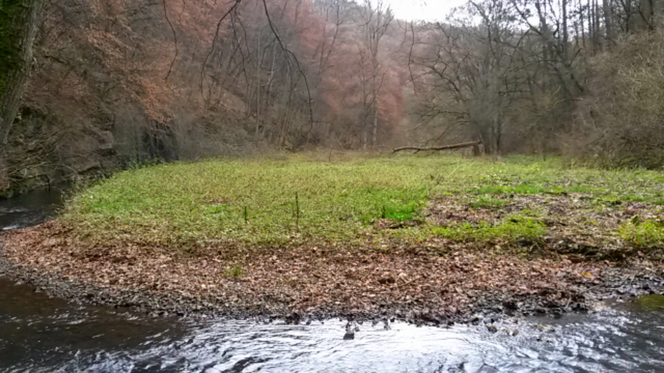 Radotínské údolí